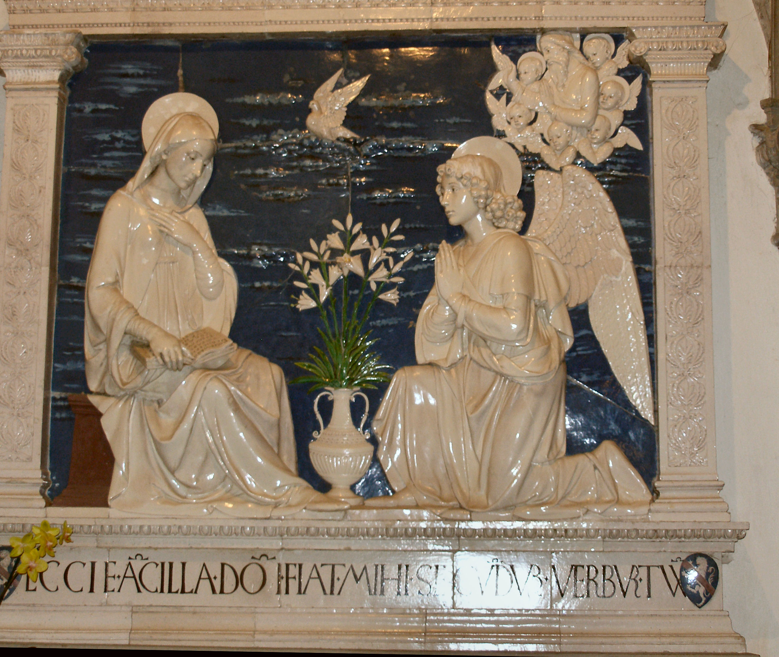 Andrea della Robbia, Annunciazione. Terracotta smaltata nel Santuario della Verna, a Chiusi.